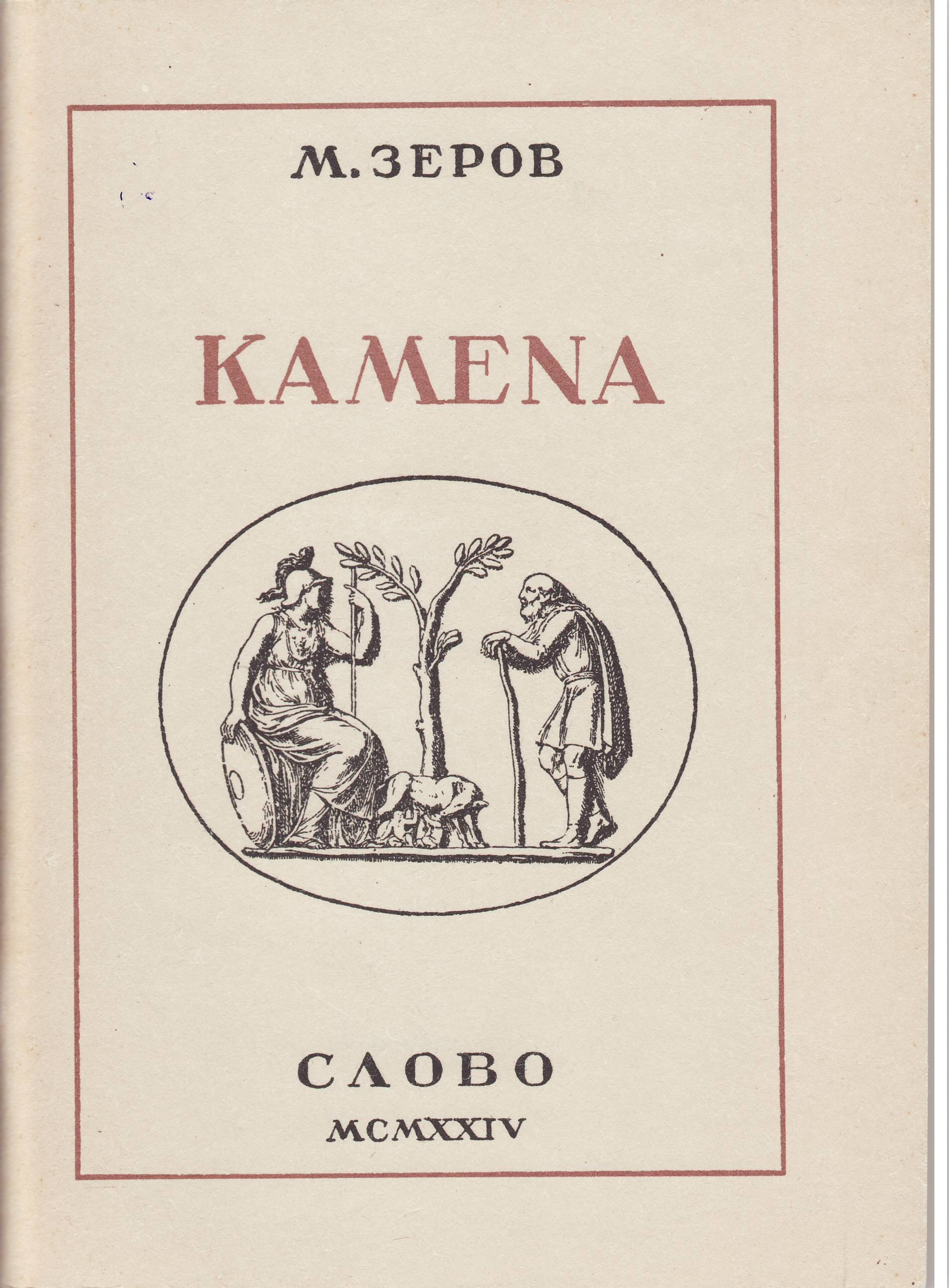 Фото обкладинки книжки Миколи Зерова "Камена"